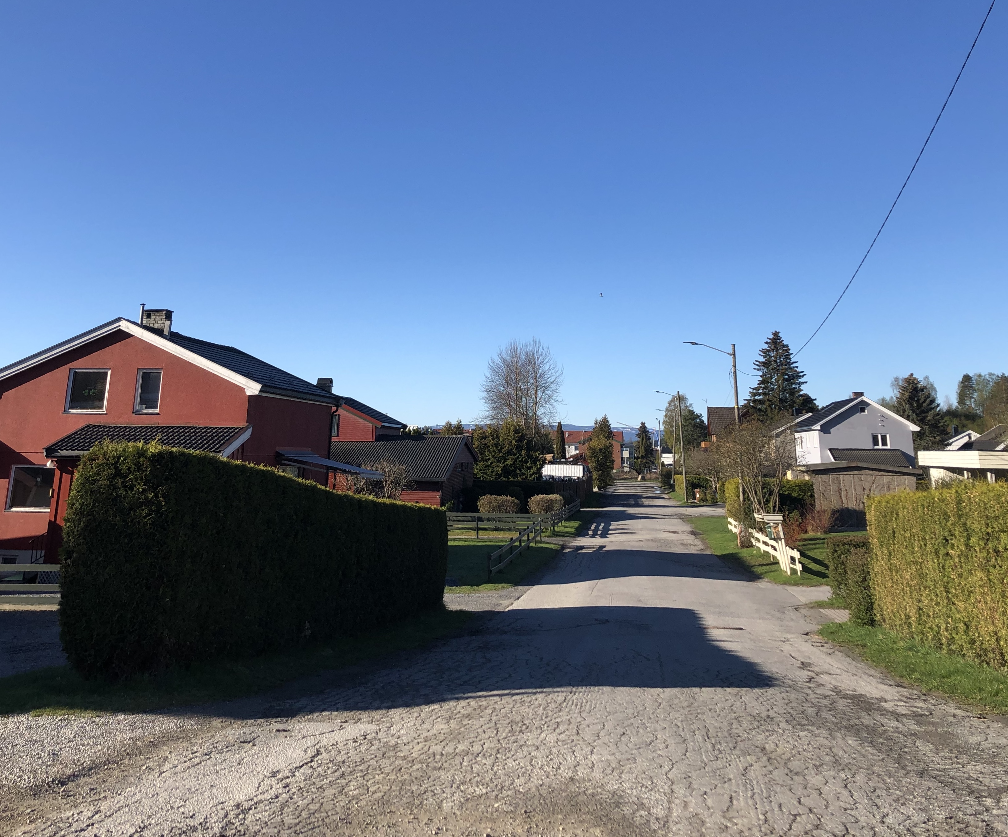 Olav Duuns vei, Hønefoss